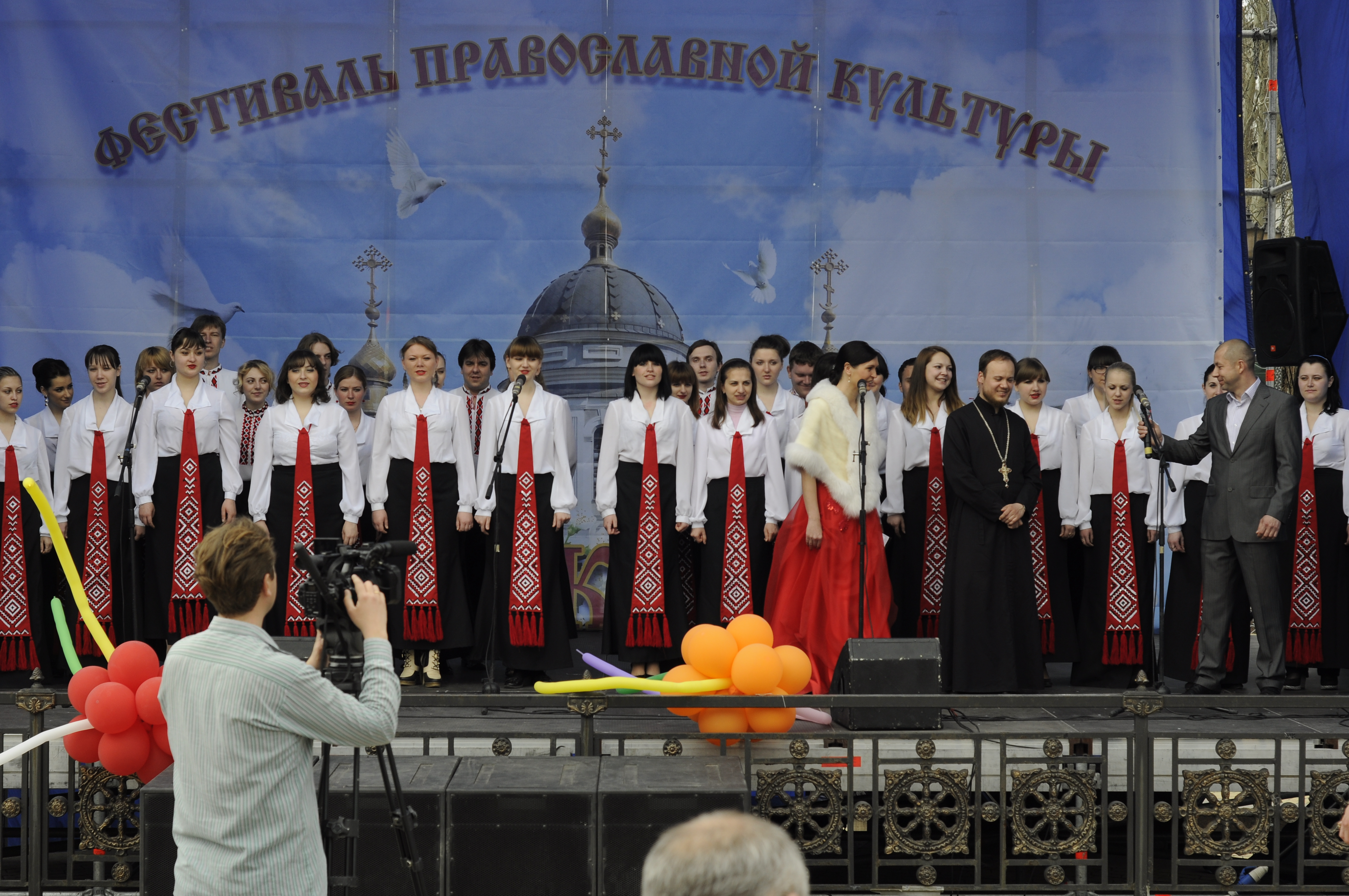 Донецк. Бульвар Пушкина. Фестиваль православной культуры «Пасха Красная» — 2011